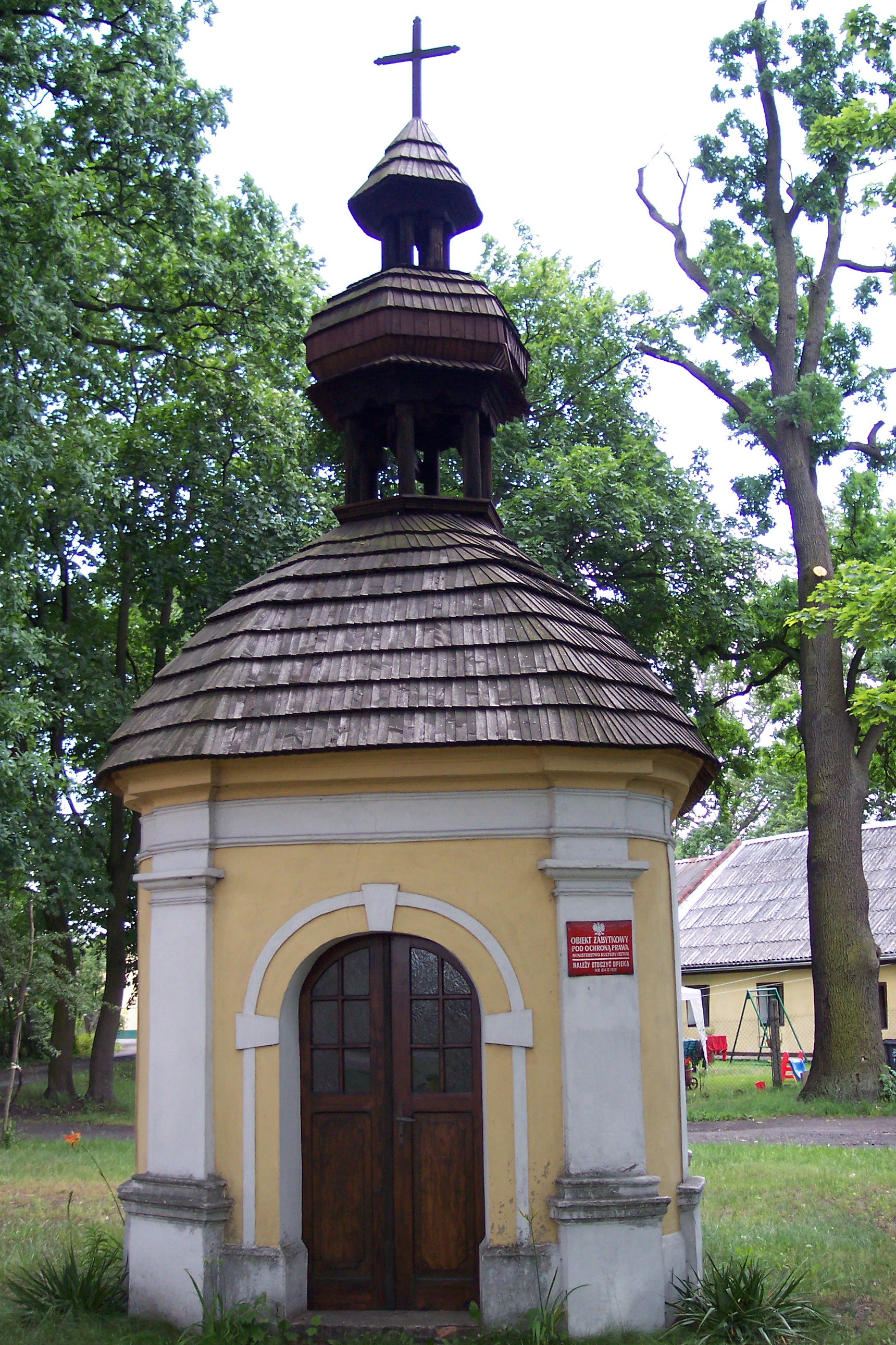 Zabytkowa kapliczka nieopodal zamku w Tworogu